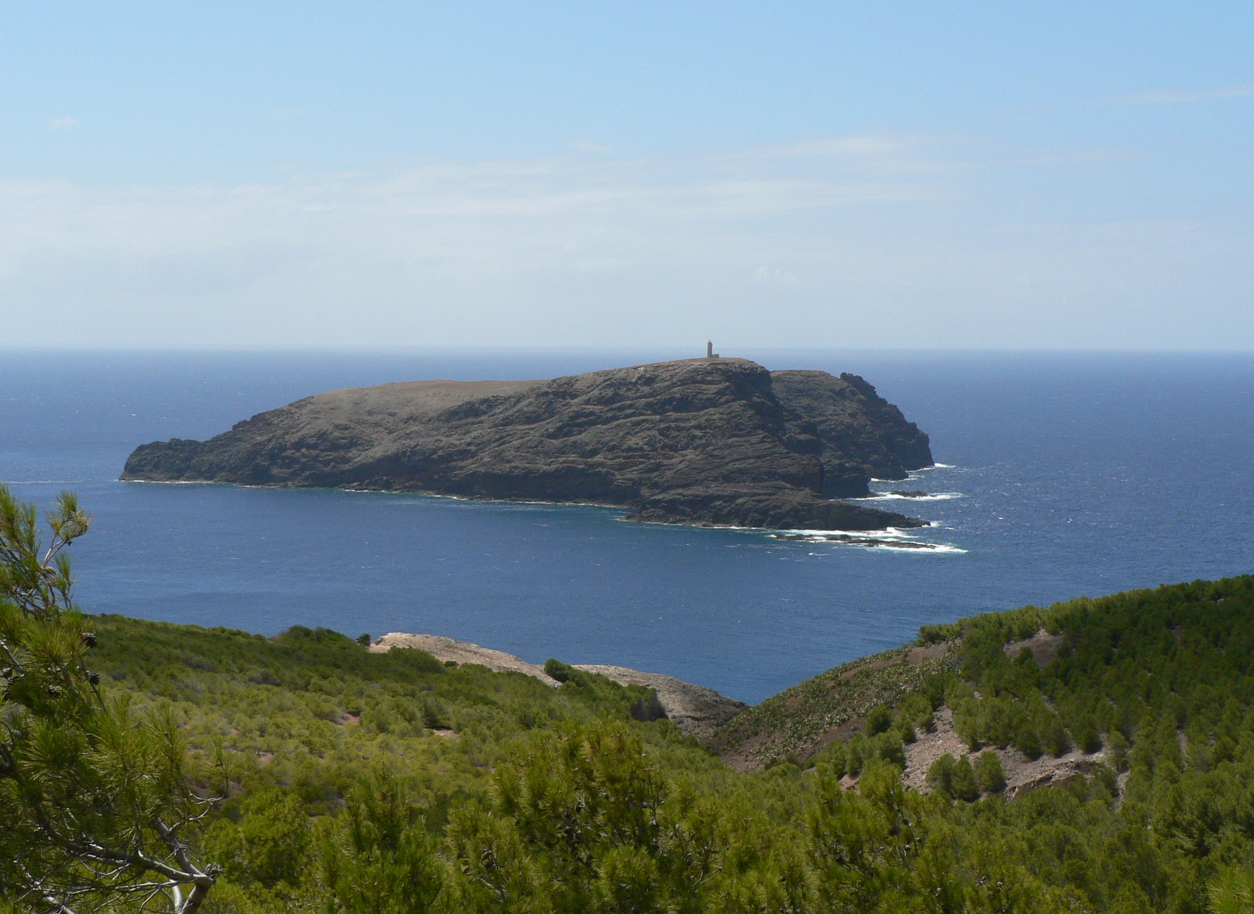 Ilhéu de Ferro e Farol, ilha do Porto Santo, arquipélago da Madeira, Portugal.